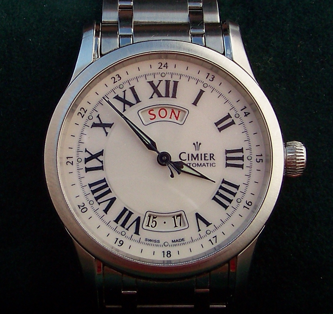 Cimier C 1924 Automatic Ref. 2405 mit ETA 2836-2-Werk